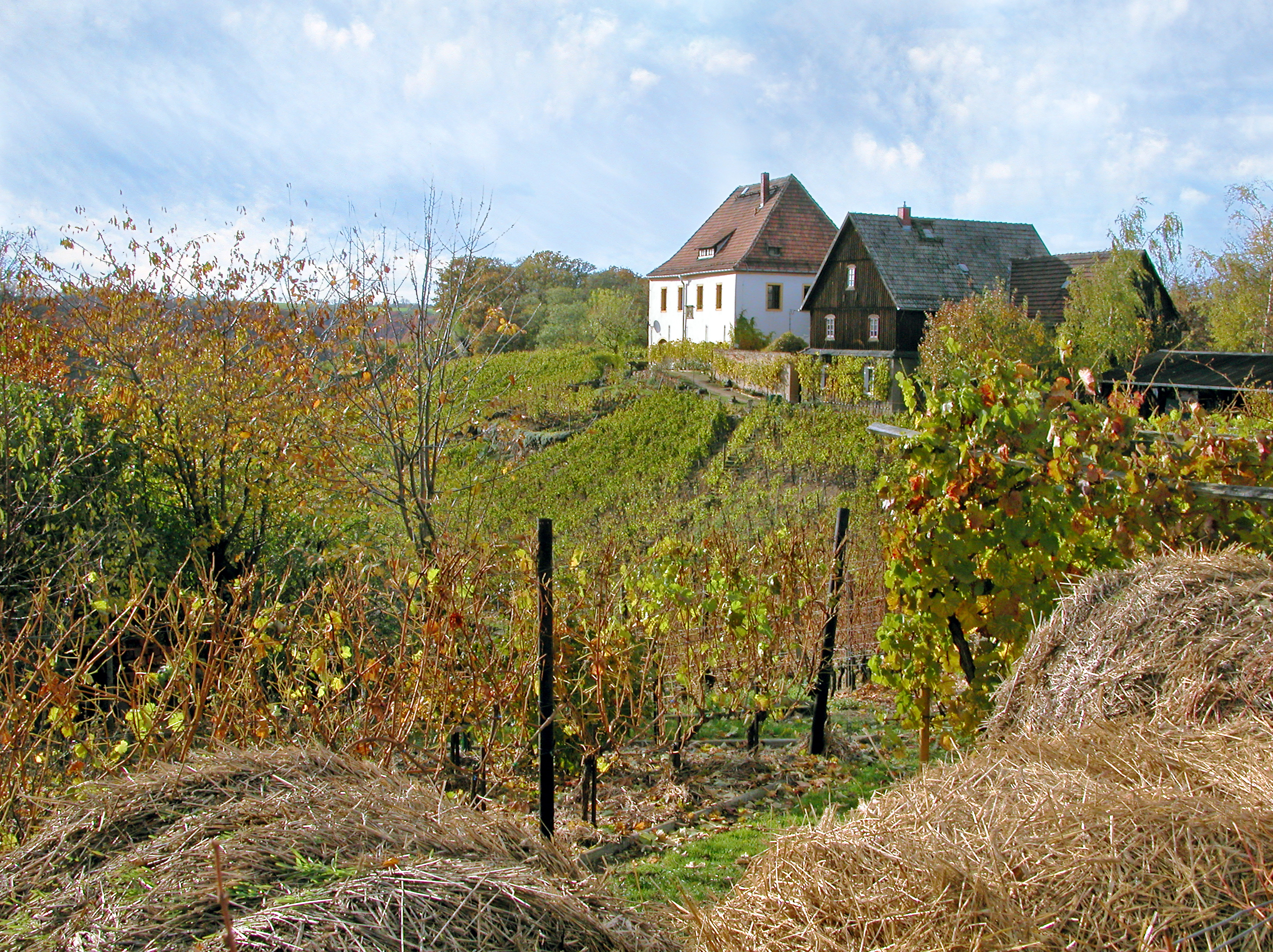 05.11.2009 01662 Meißen: Haagsches Weingut, Kapitelholzsteig 3 (GMP 51.142041,13.508564) im Spaargebirge. Boselberg in der Weinbergslage Meißner Kapitelberg. 1633 ist der Weinberg erstmals nachweisbar. Sicht von Nordosten. [DSCN40019.TIF]20091105440.JPG(c)Blobelt